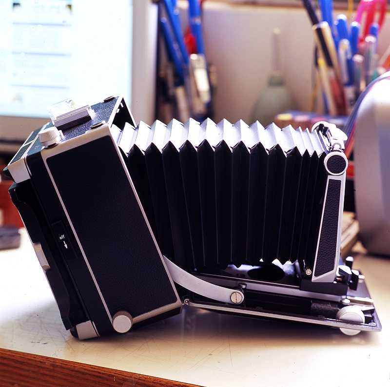 Linhof Master 2000 Kamera